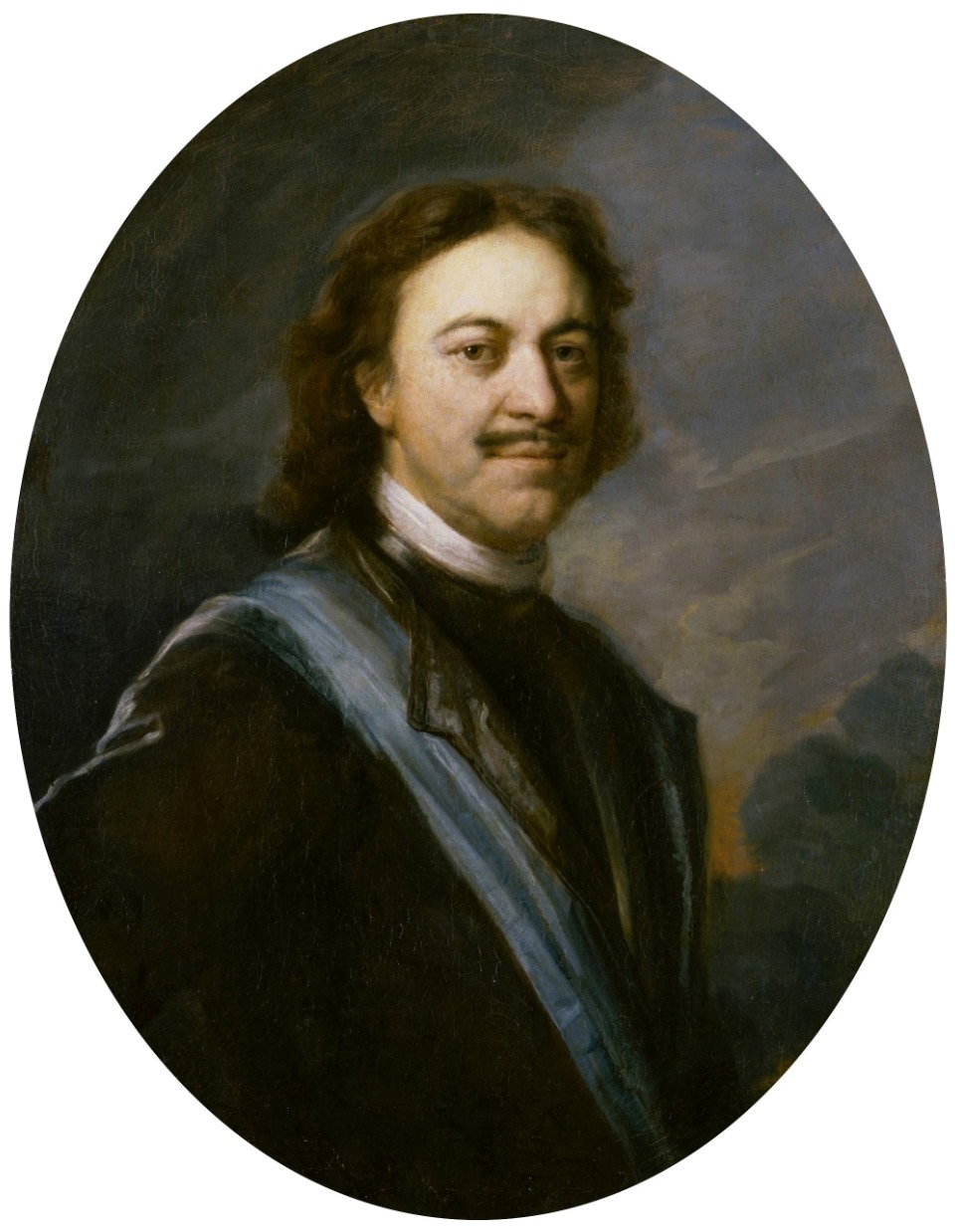 Андрей Матвеев, портрет Петра I. Холст, масло. Копия с работы Карела де Мора (1717).